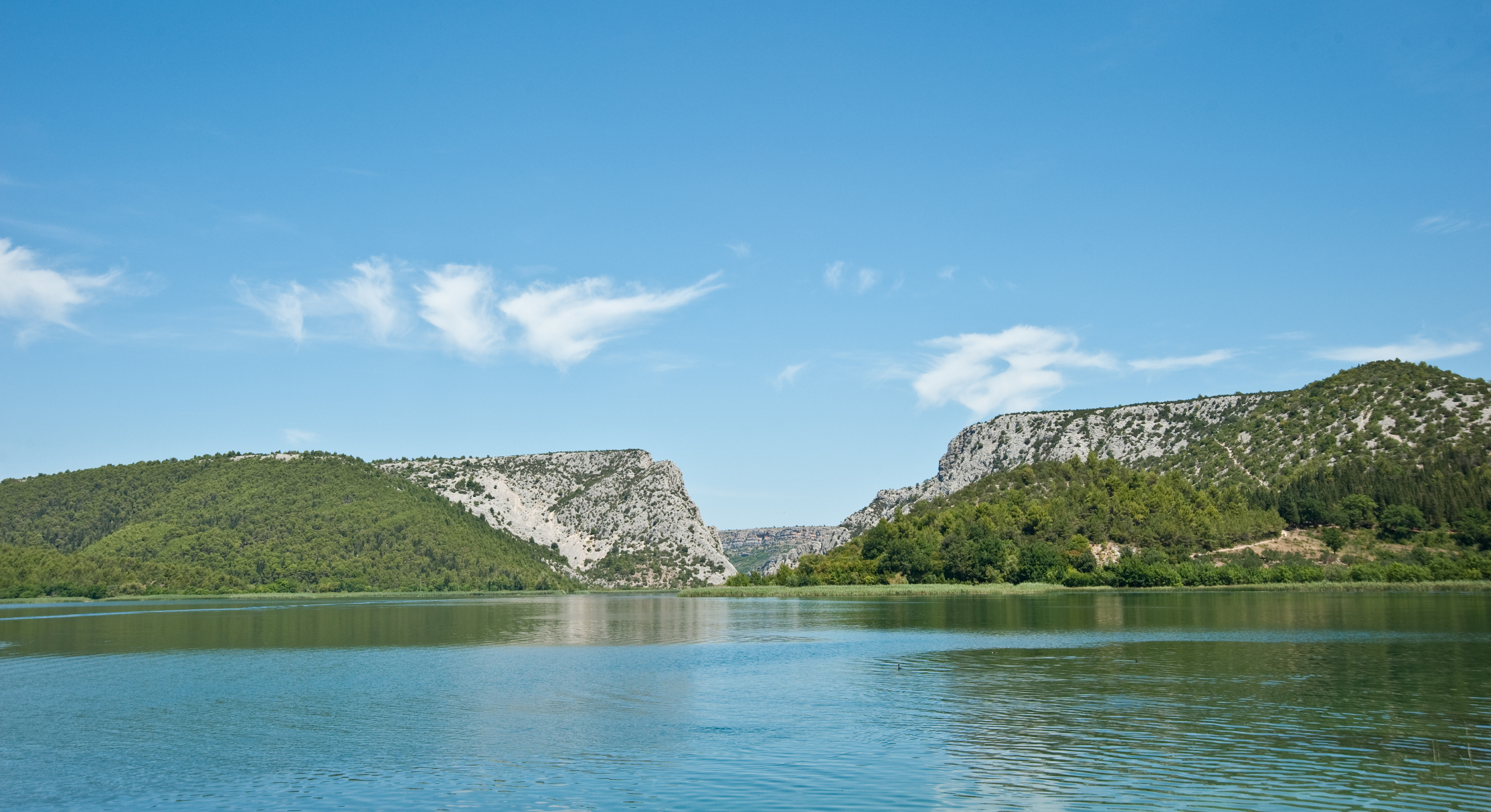 Visovačko jezero, pogled s Visovca prema Roškome slapu